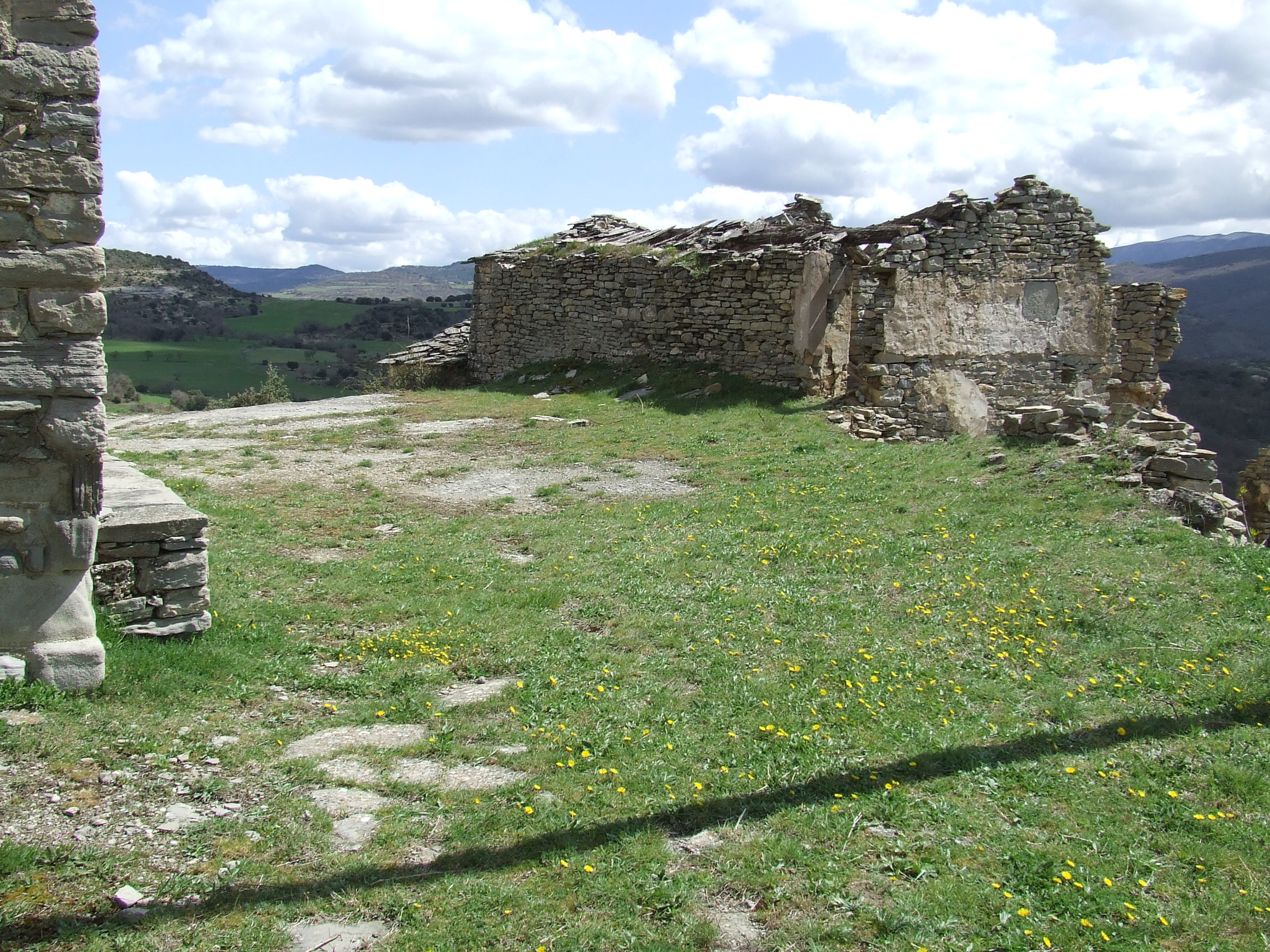 Lloc on hi hagué l'església romànica (Castissent, Fígols de Tremp, Tremp, Pallars Jussà)